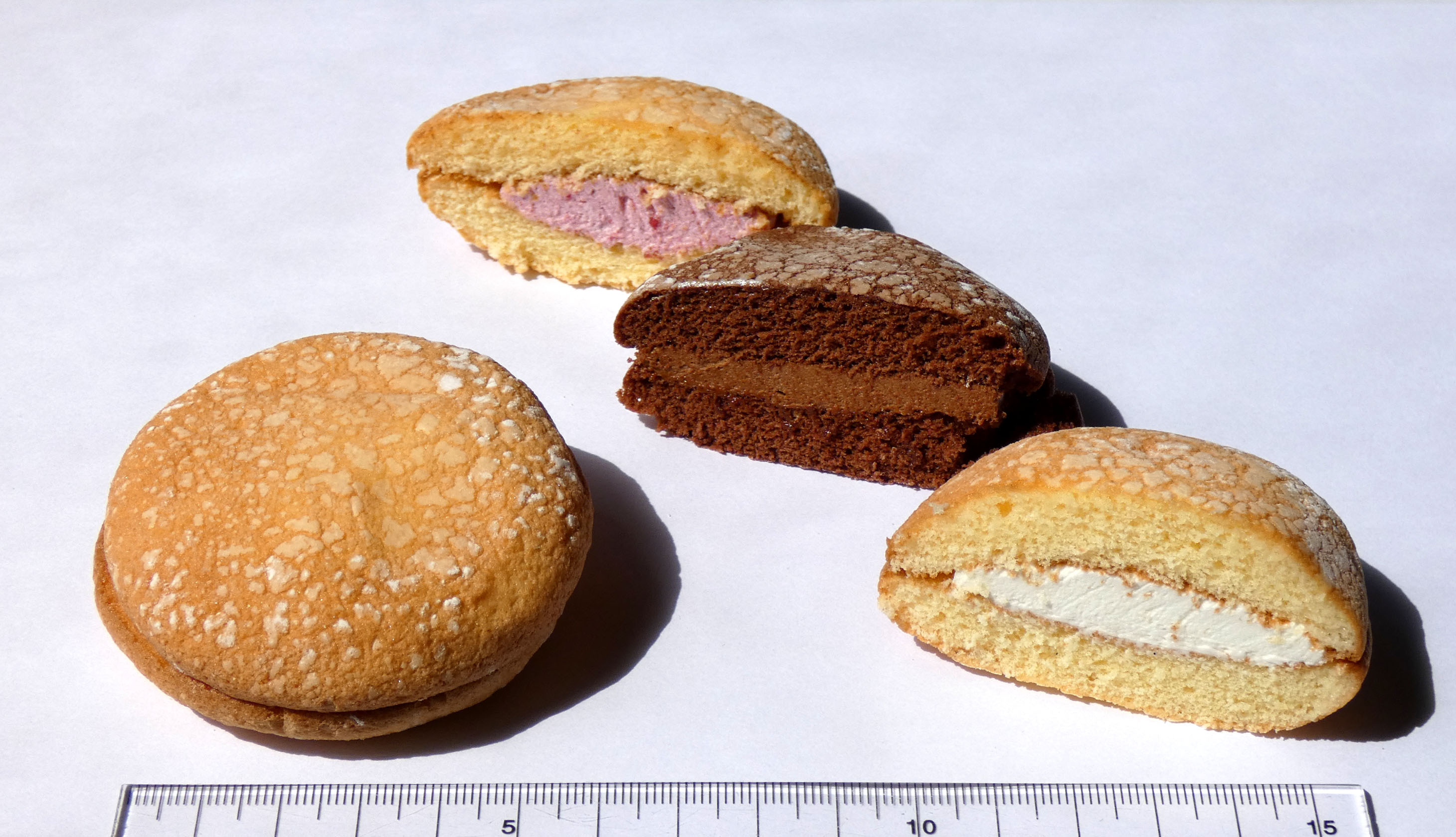 亀屋万年堂のナボナ（右手奥から、ミックスベリー、チョコレート、バニラ）